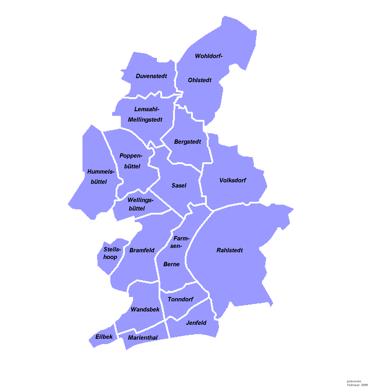 Stadtteile im Bezirk Wandsbek von Hamburg.